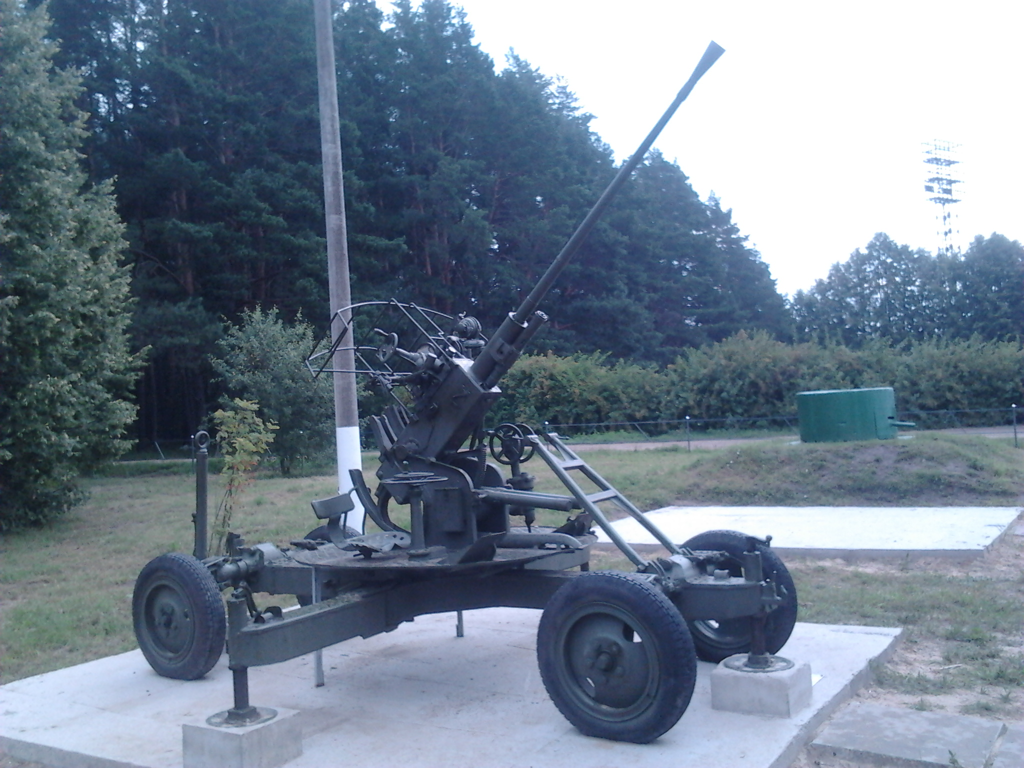 Мемориал Рубеж Обороны Протвино